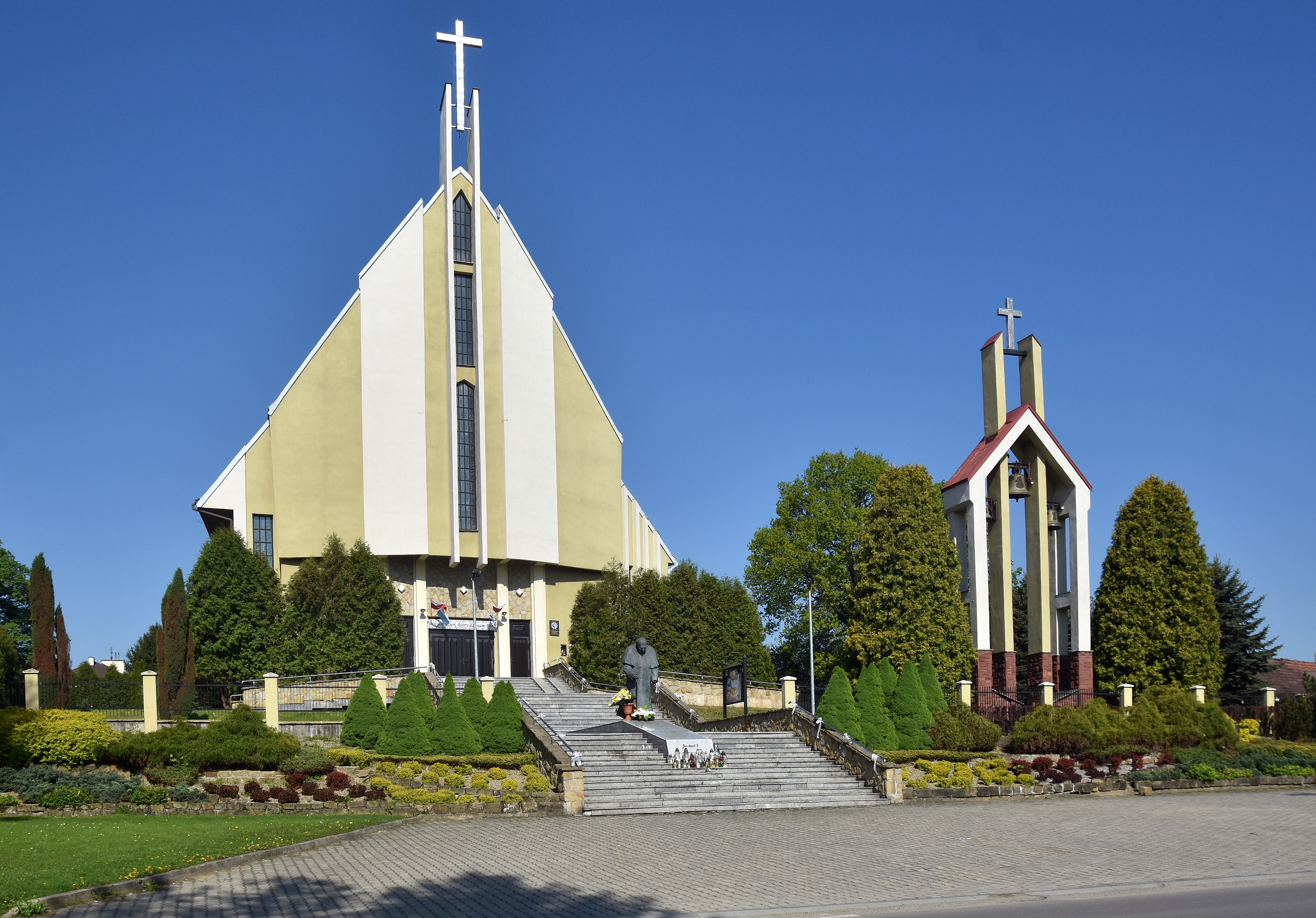 miasto Jasło